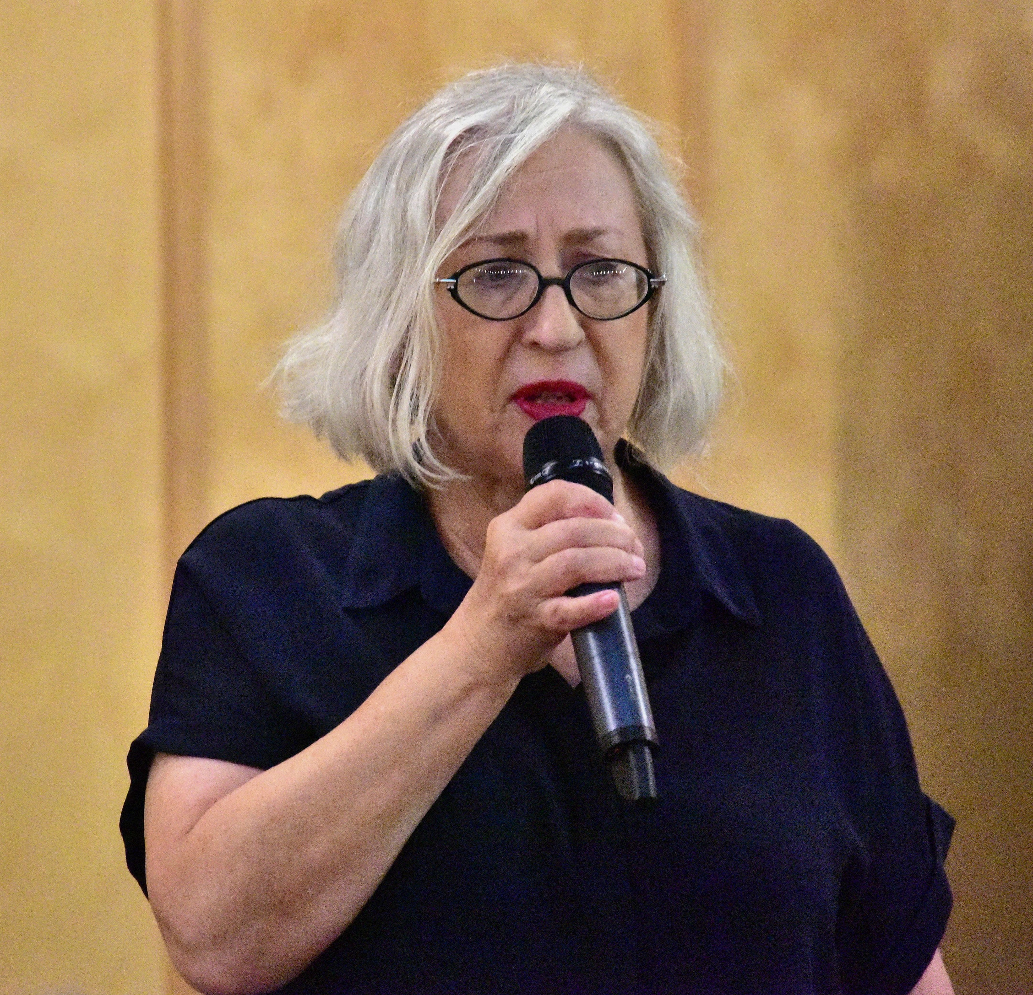 Dr. hab. Anna Giza-Poleszczuk, prorektor Uniwersytetu Warszawskiego, podczas konferencji Innowacyjna gospodarka w BUW